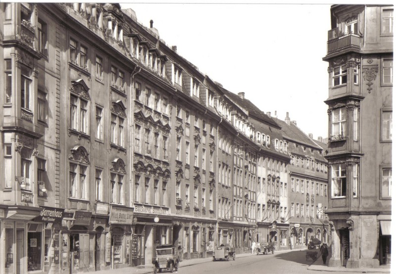 Dresden, Große Meißner Gasse in der Neustadt, abzweigend vom Neustädter Markt mit dem Rathaus und dem Blockhaus. Der Großteil der Bauten entstammte noch dem Barock. Im 2. Weltkrieg weitgehend zerstört, blieb nur noch das Bürgerhaus "Die Regierung", das heute das neue Hotel Bellevue beherbergt.